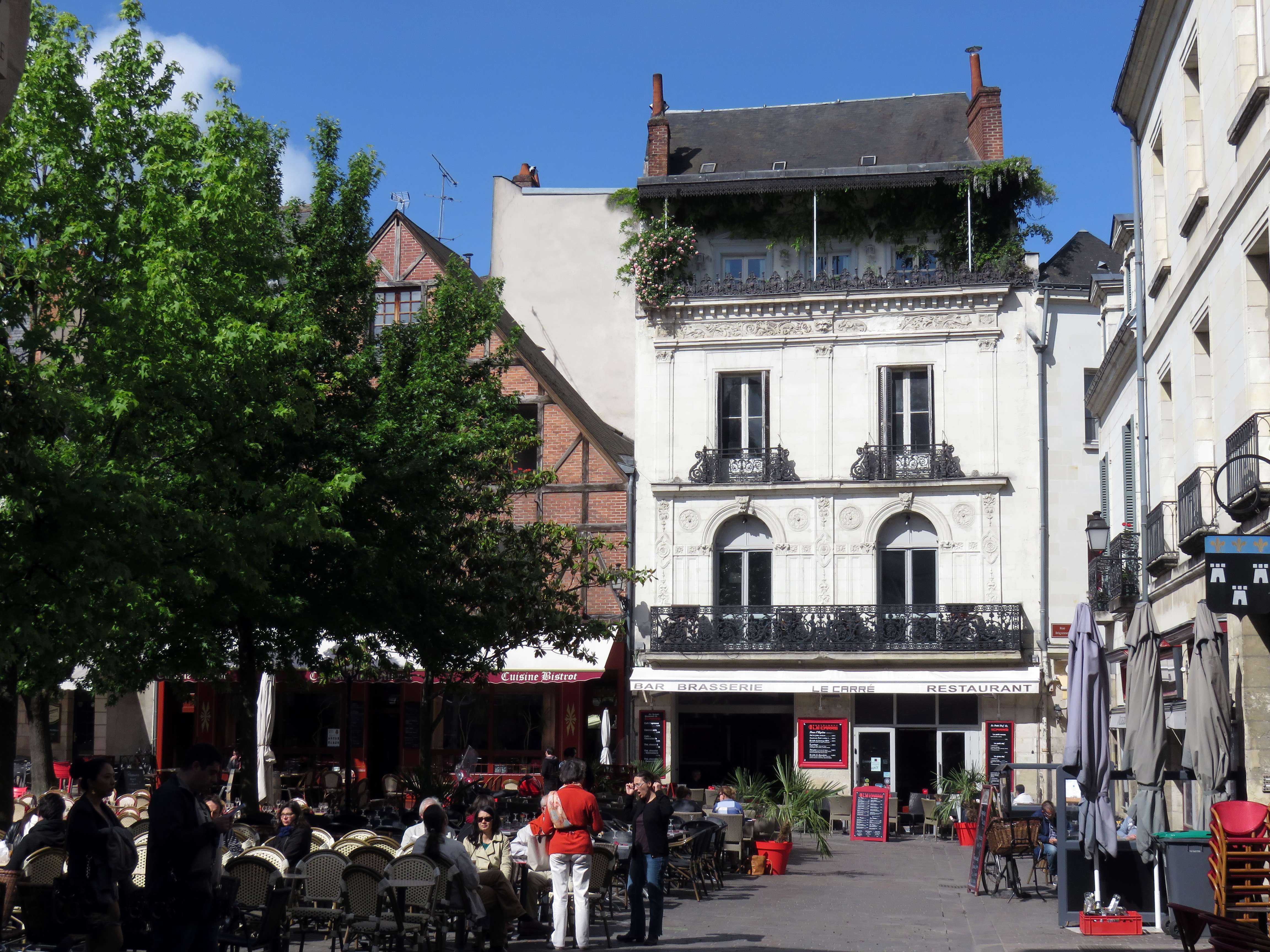 La Place Plumereau coté Ouest.